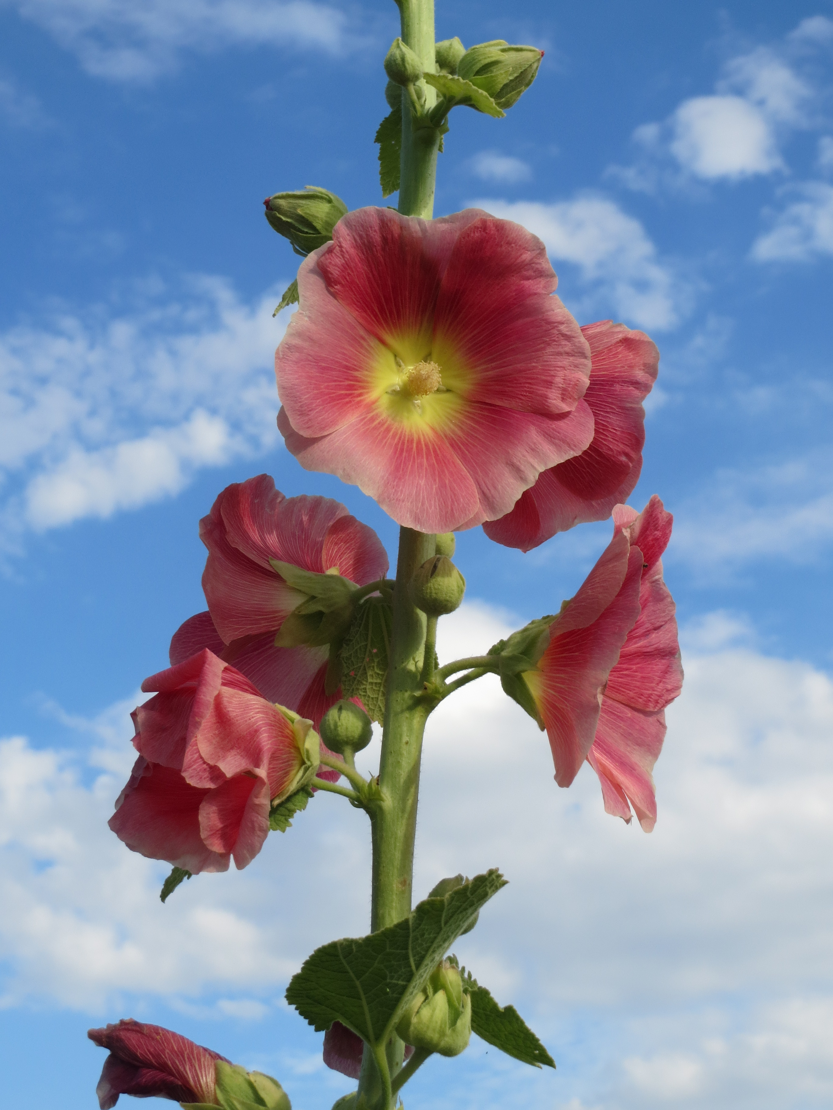 Stockrose (Alcea rosea) bei Hockenheim